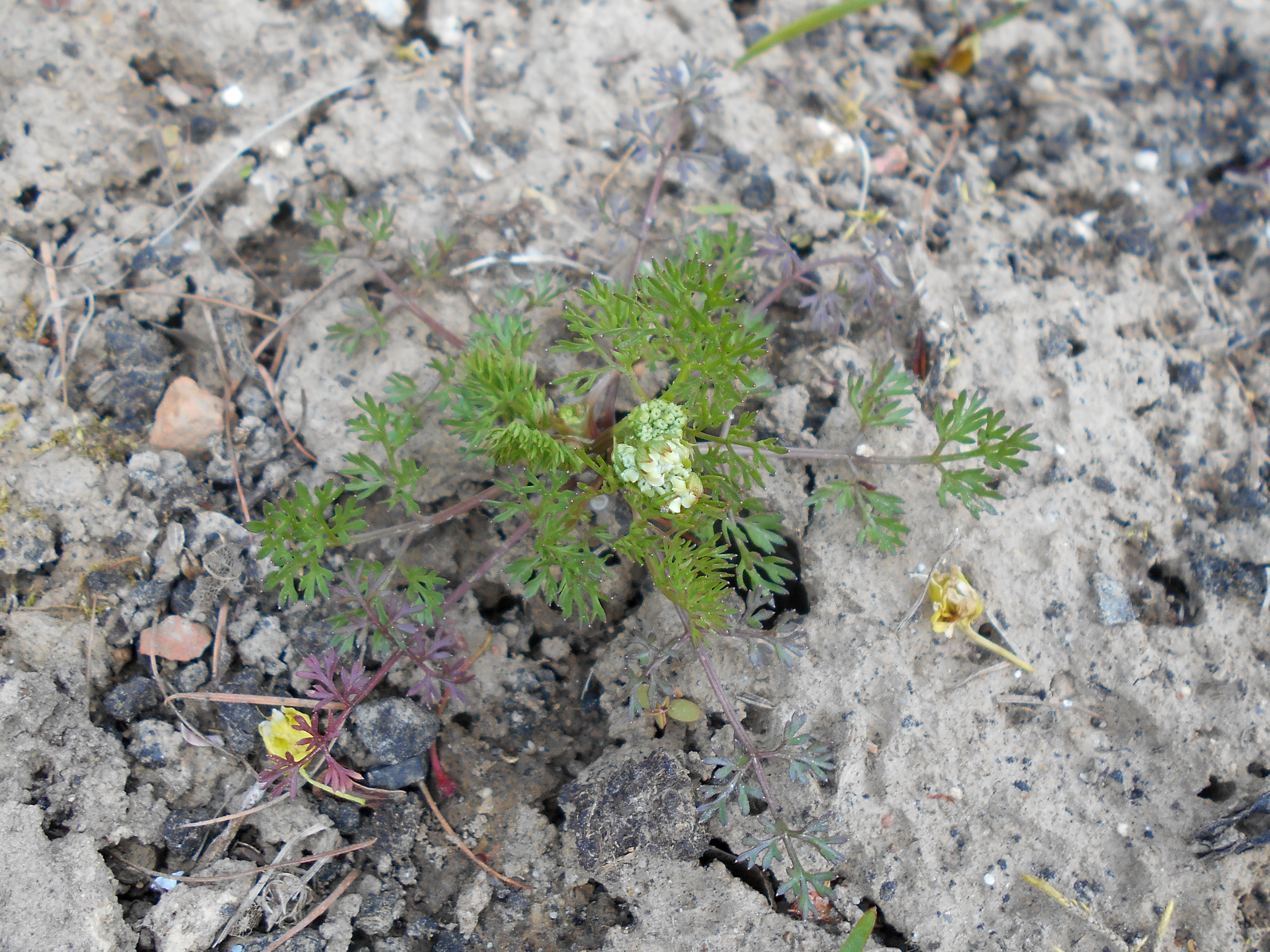 Portenschlagiella ramosissima, Ogród Botaniczny UMCS w Lublinie.